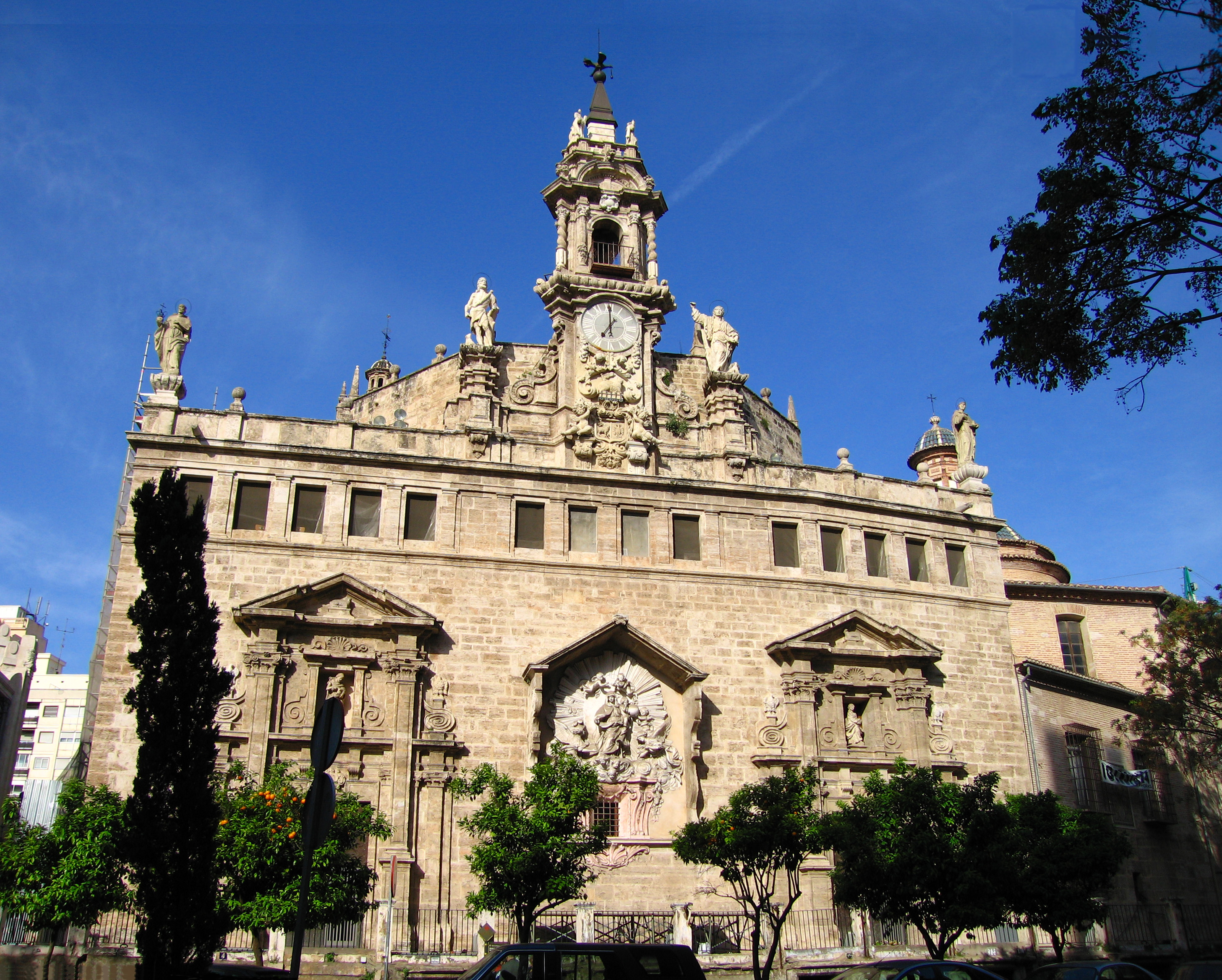 Sant Joan del Mercat de València